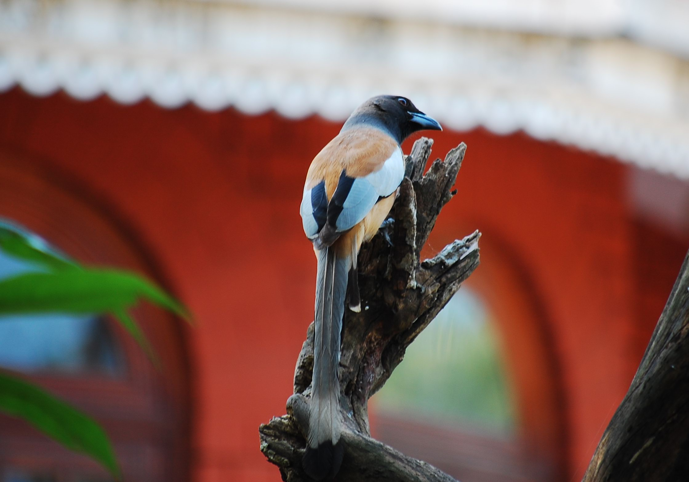 Dendrocitta vagabunda